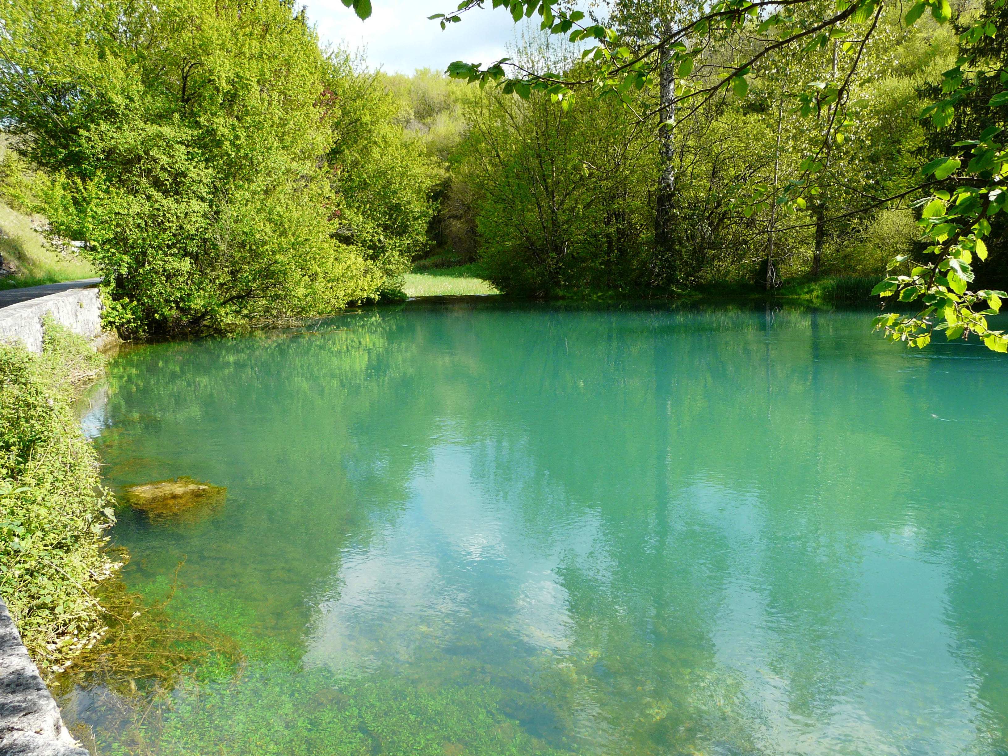 La Doux de Coly (résurgence du Coly) au moulin de Ladoux, La Cassagne, Dordogne, France